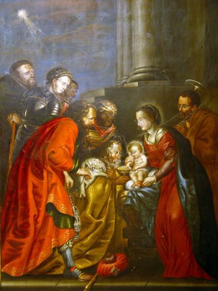 Epifanía, óleo sobre lienzo, Camarín de la Virgen de los Remedios, Sonseca (Toledo)